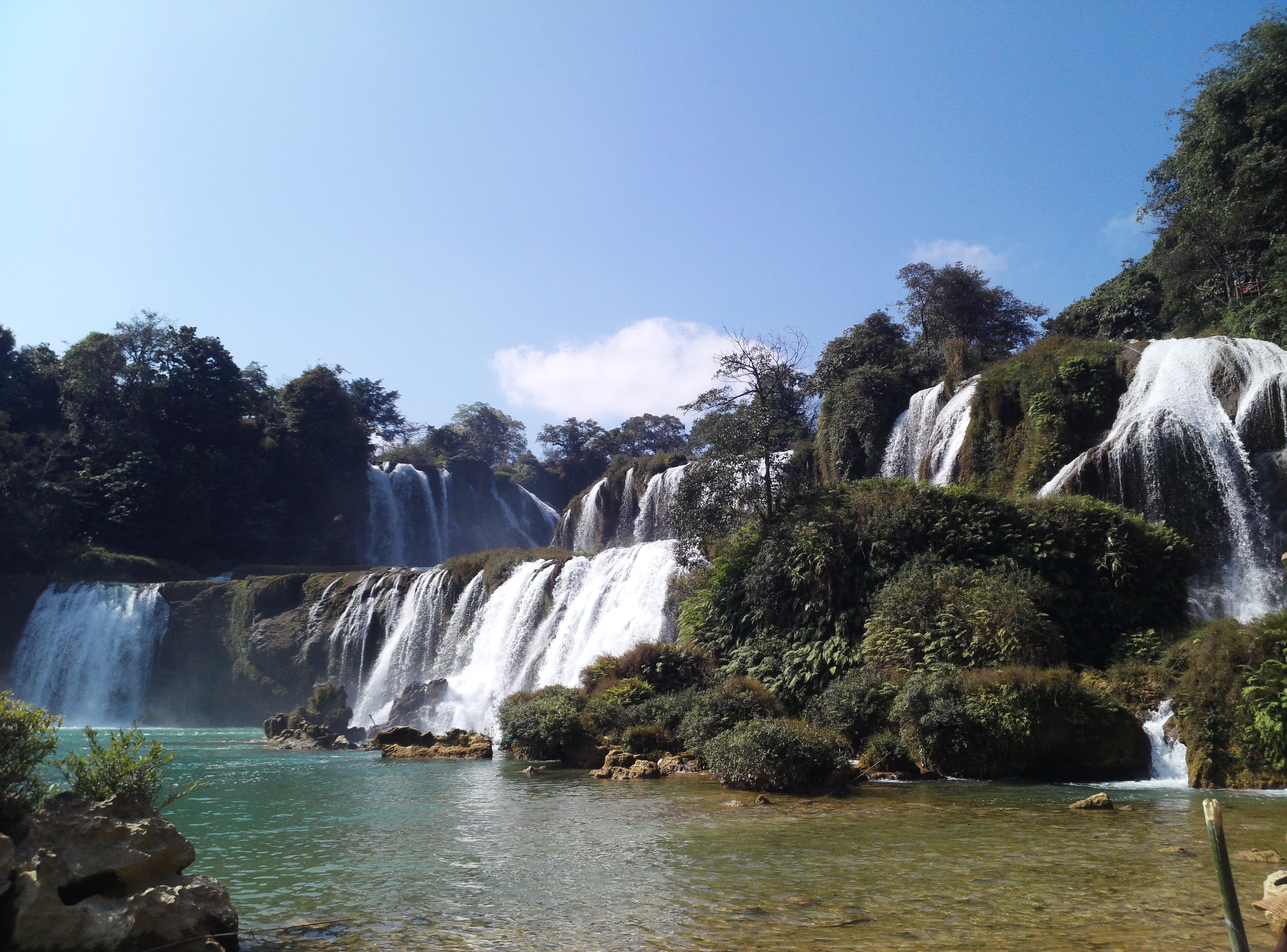 從中國境內觀看的德天瀑布